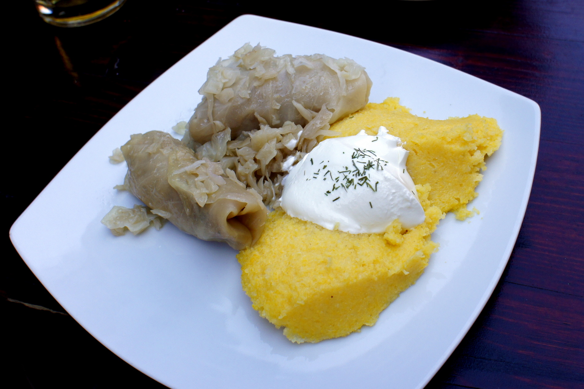 Mamałyga jako dodatek do gołąbków (sarmale) - Sighișoara w Siedmiogrodzie, Rumunia